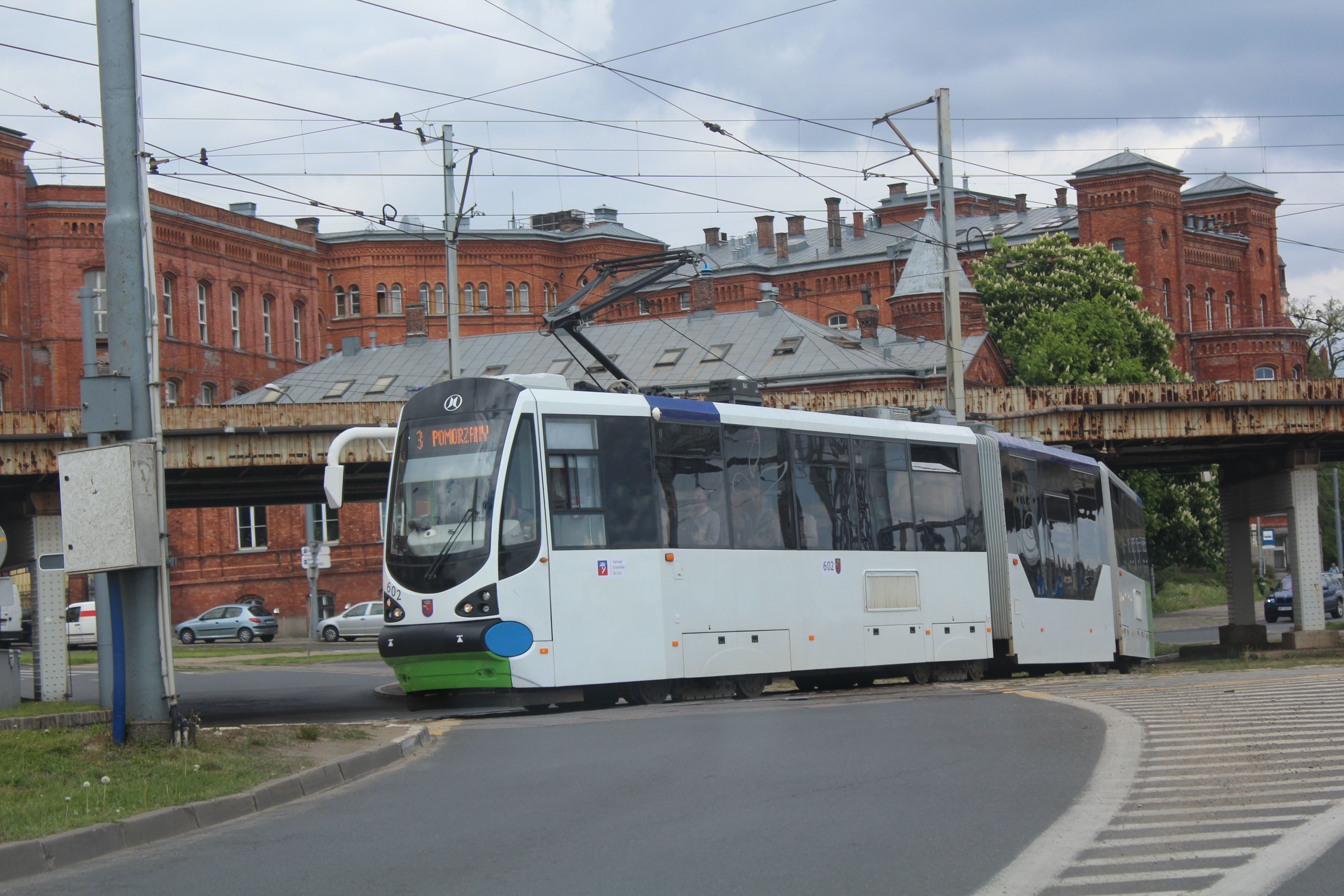 Moderus Beta w Szczecinie